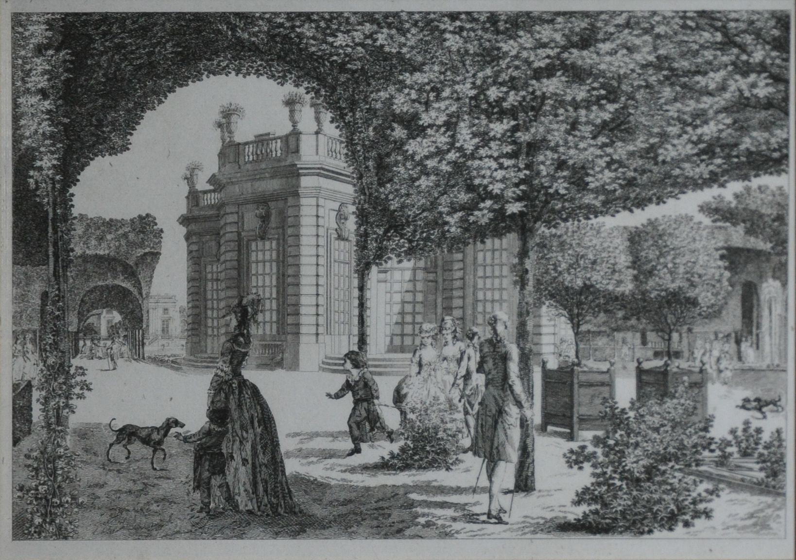 Marie-Antoinette d'Autriche tenant par la main son second fils, le duc de Normandie, futur Louis XVII, se promenant en compagnie du Dauphin et de Madame Royale, à proximité du Pavillon français et du théâtre de la Reine, dans les jardins du Petit Trianon - gravure de François-Denis Née d'après un dessin du chevalier de Lespinasse